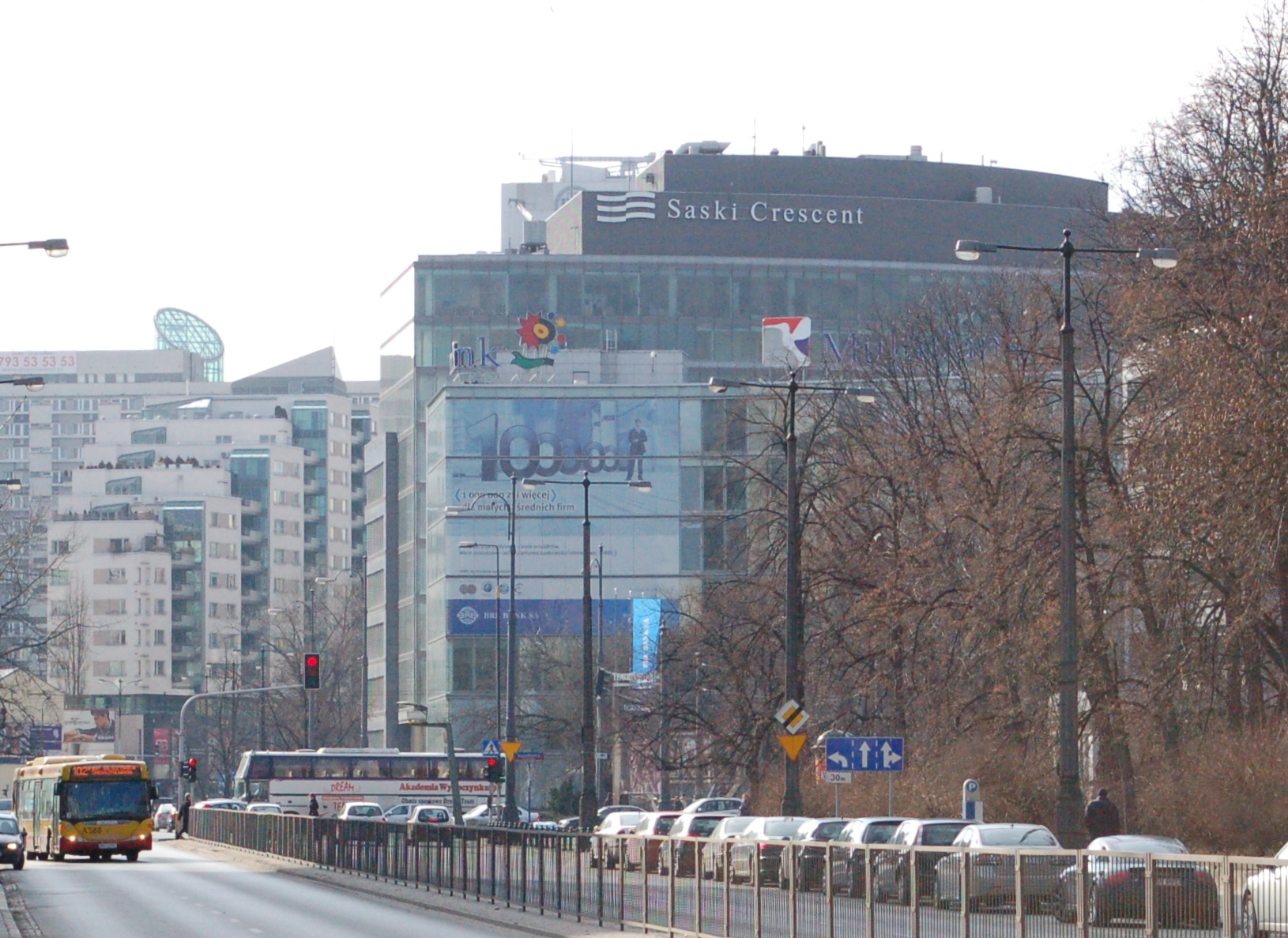 Warschau